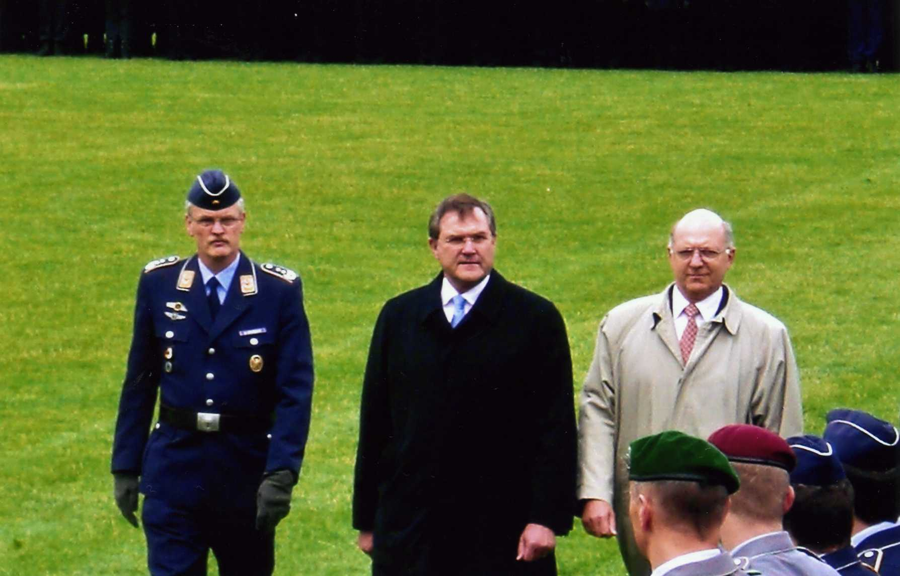 Leutnantsbeförderung 2007 HSU - Oberst Schmidt, Verteidigungsminister Dr. Jung und Universitätspräsident Prof. Dr. Zeidler